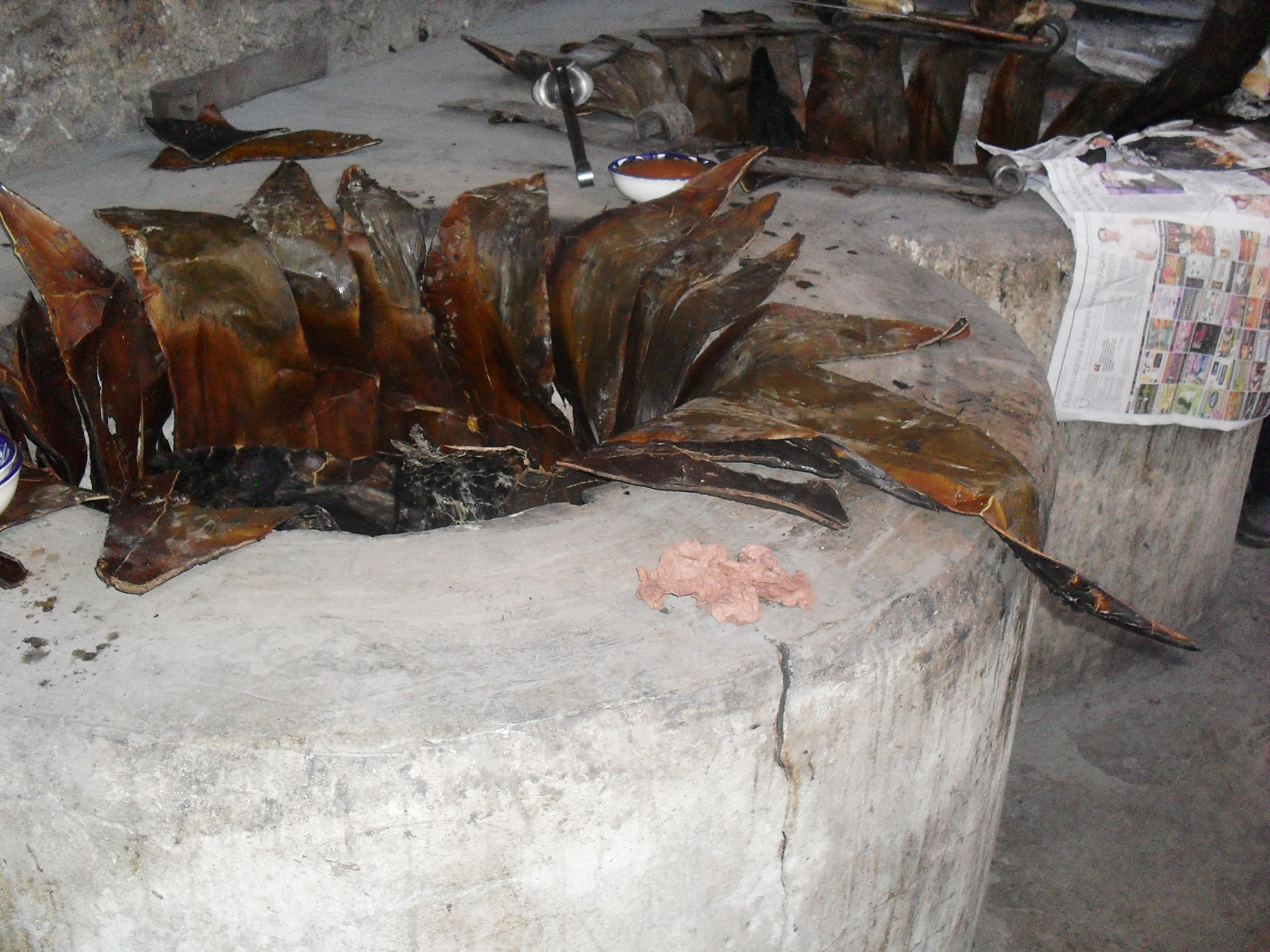 Horno en el que se hace la barbacoa